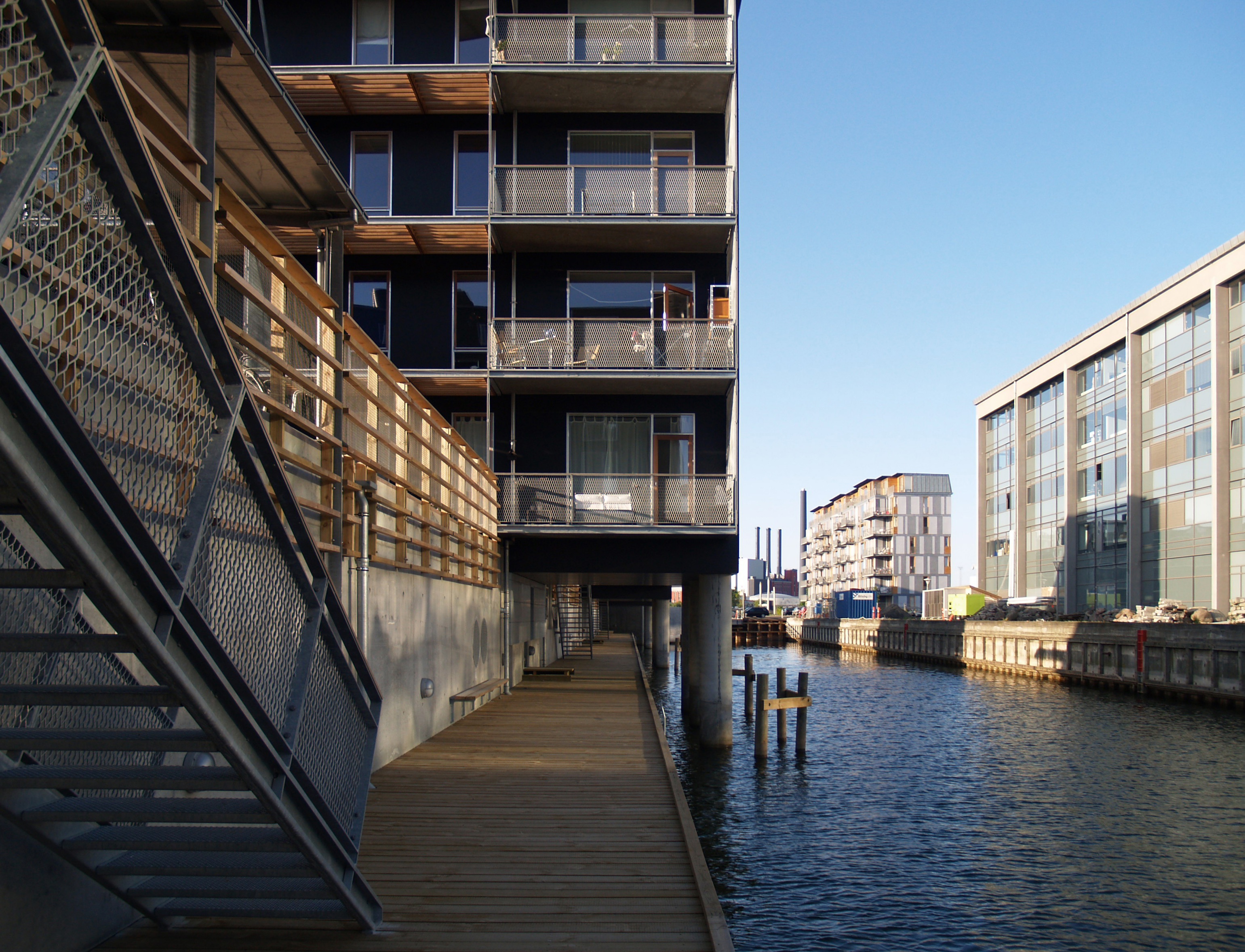 teglværkshavnen harbour housing, copenhagen denmark, 2003-2008. architects: tegnestuen vandkunsten.